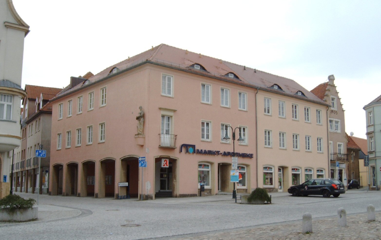 Teilansicht vom Markt Neustadt in Sachsen